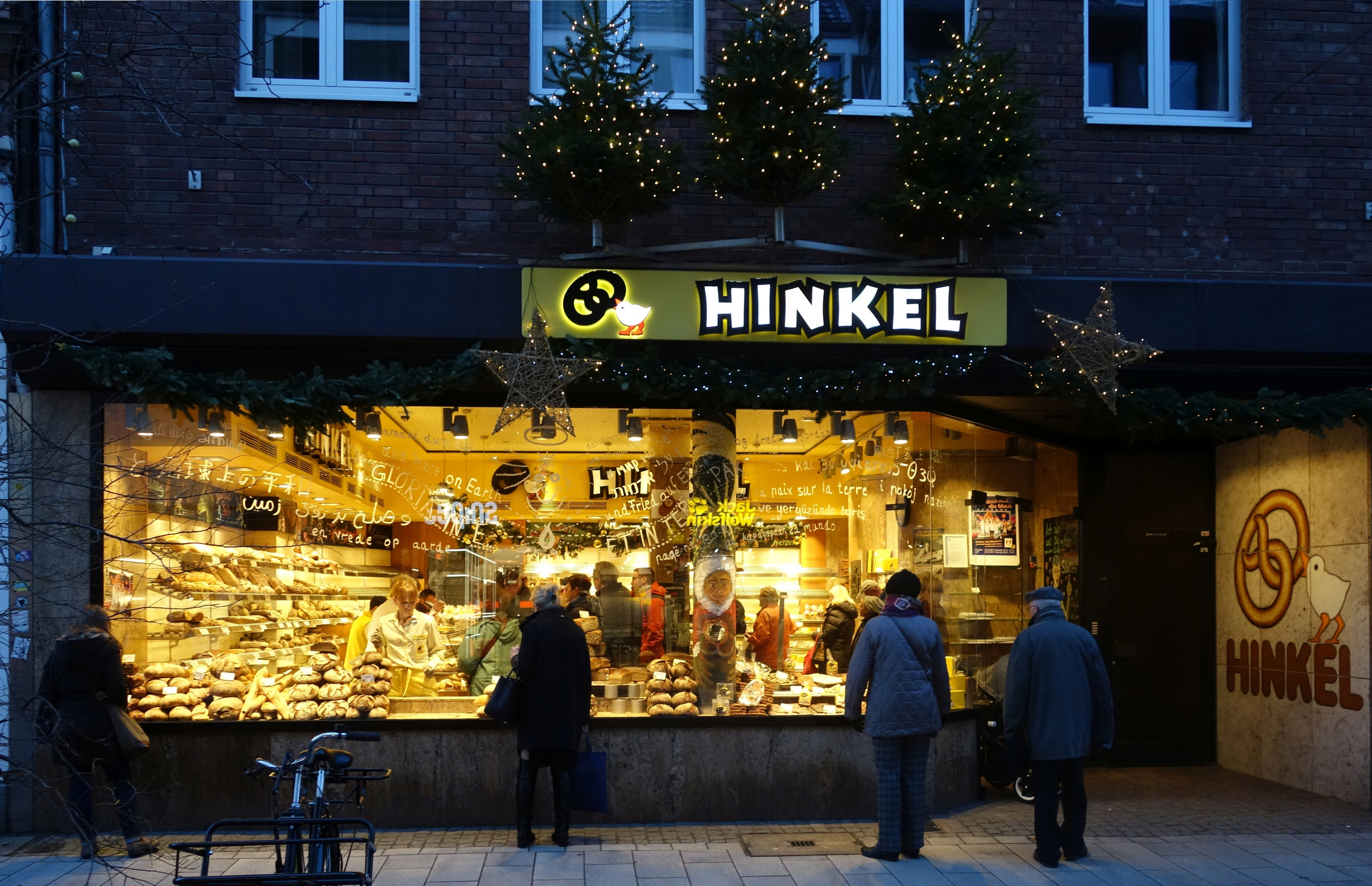 Bäckerei Hinkel, Düsseldorf, Dezember 2017.